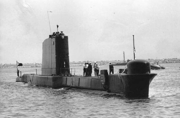 הצוללת אח"י לויתן בהפלגות ראשוניות על רקע החוף האנגלי